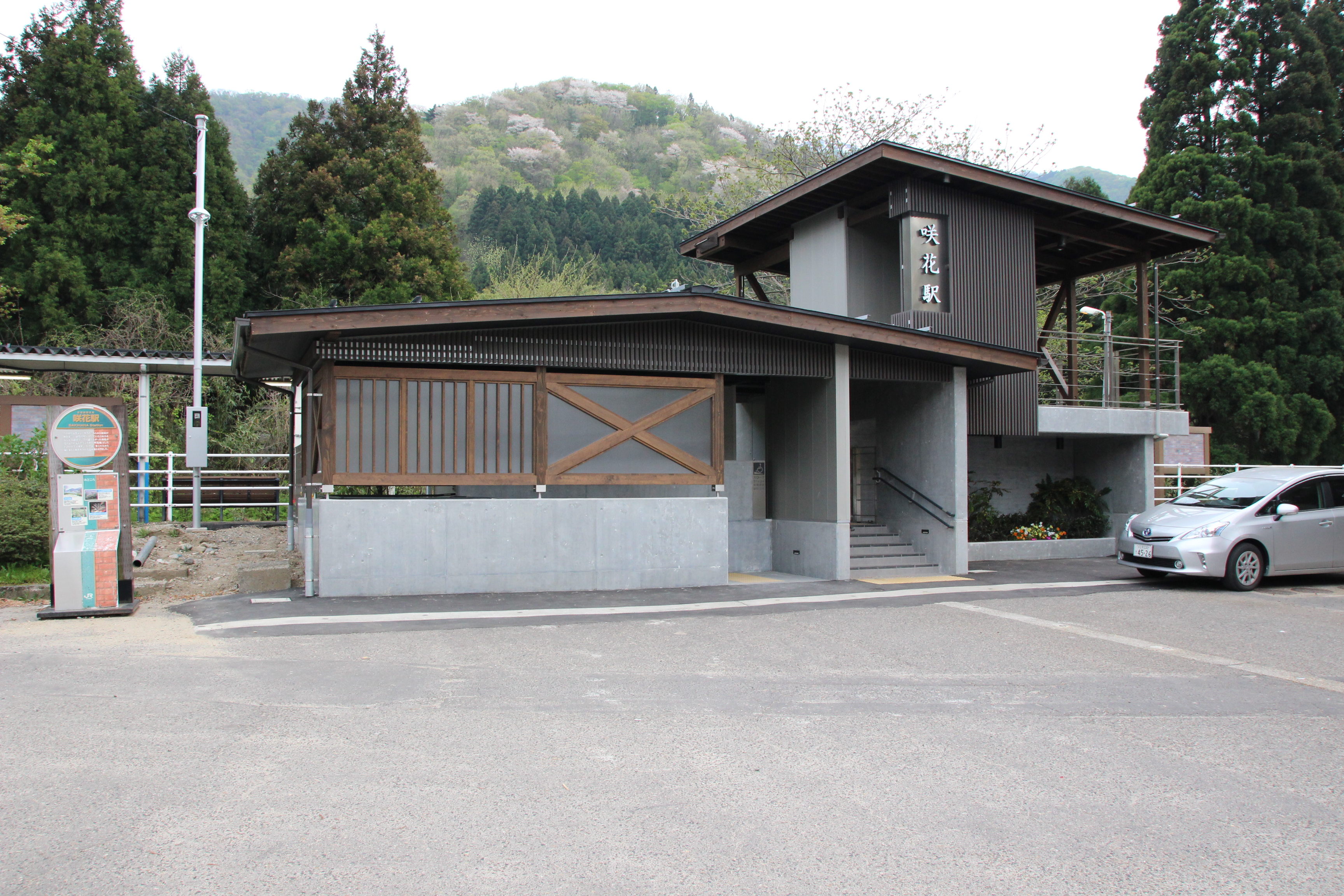 現在の咲花駅の全景です。